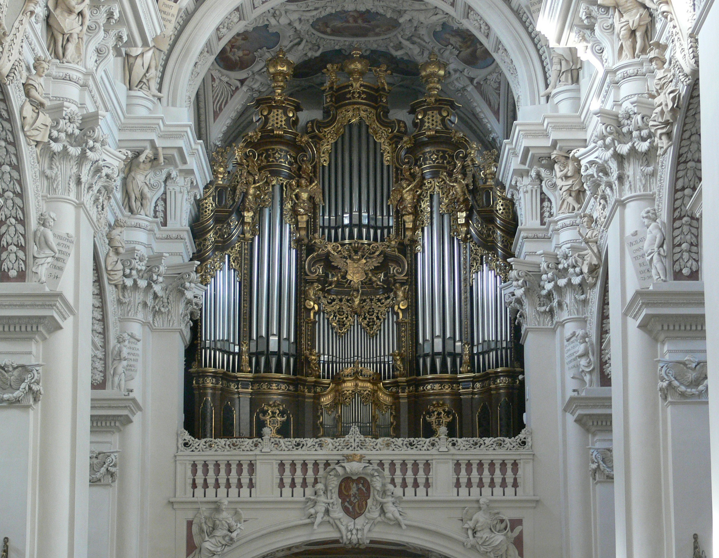 Passau, Dom, Orgelempore und Orgel